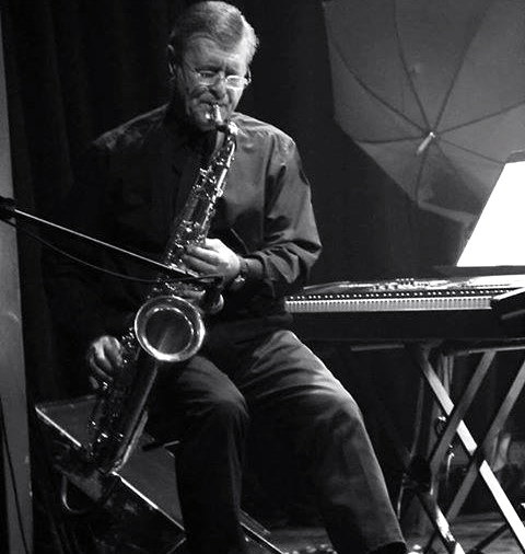 Playing the horn (Black & White Photo)